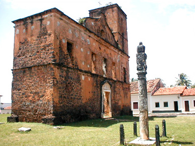 Pelourinho in Alcântara